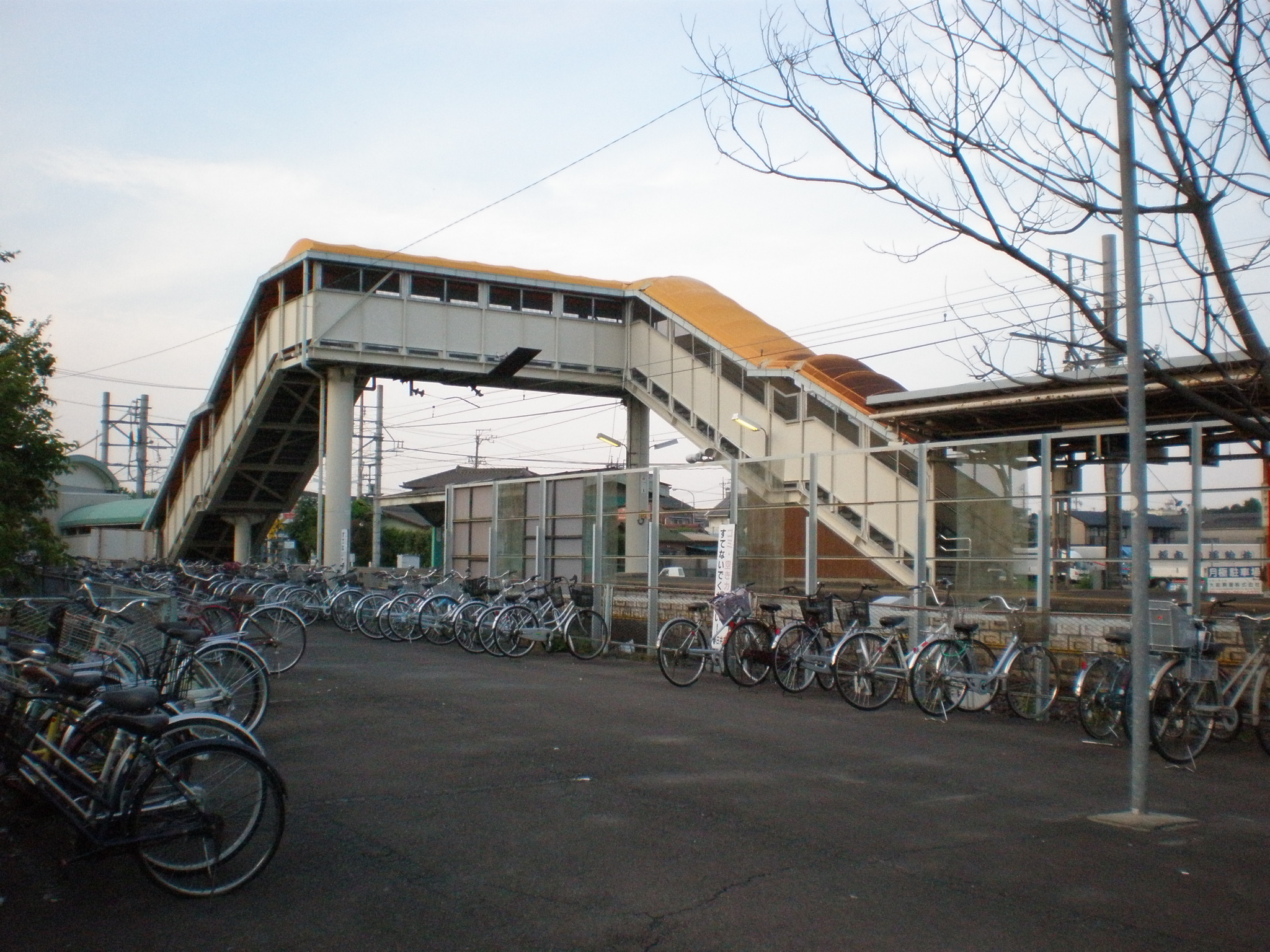 愛知県春日井市にある春日井駅（名鉄）